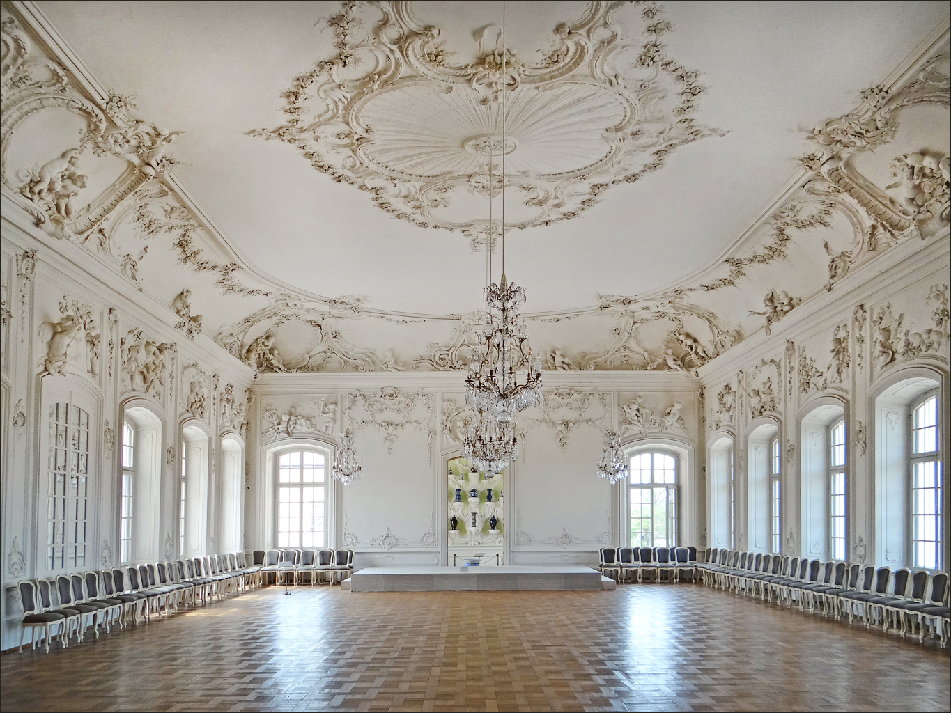 Le salon blanc (white hall) est la plus grande pièce du palais (308 m2) Initialement prévue pour servir de chapelle, la pièce a été transformée en salle de bal et terminée en 1770. Les décorations en stuc de JM Graff sont exceptionnelles, elles représentent des allégories des 4 saisons, des scènes pastorales, artisanales, etc. Le salon a été restauré de 1973 à 1980 par des russes. ___________ Le palais de Rundale est l'un des monuments les plus remarquables de l'art baroque et rococo en Lettonie. Il a été construit entre 1736 et 1740 comme résidence d'été du duc de Courlande : Ernst Johann von Biron (1690-1772), favori de l'impératrice de Russie Anna Ioannovna (1693-1740). L'architecte italien Francesco Bartolomeo Rastrelli (1700-1771) a conçu le Palais de Rundale et en a supervisé les travaux de construction. Il est l'architecte de nombreux bâtiments officiels de Saint Pétersbourg. Après la mort de l'impératrice Anna Ioannovna, le duc a été arrêté et envoyé en exil en Sibérie. Les travaux de construction du palais ont repris après le retour du duc en 1763 au début du règne de l'impératrice Catherine II. La majeure partie de l'intérieur du palais a été créée entre 1765 et 1768. Les maîtres italiens de Saint-Pétersbourg : Martini Francesco et Carlo Zucchi sont les auteurs des peintures sur les plafonds et les murs tandis que le sculpteur Johann Michael Graff de Berlin a fait les décorations en stuc sur fond de marbre artificiel. Article de Wikipedia sur Biron Article de Wikipedia sur le palais Site du palais de Rundale (en)